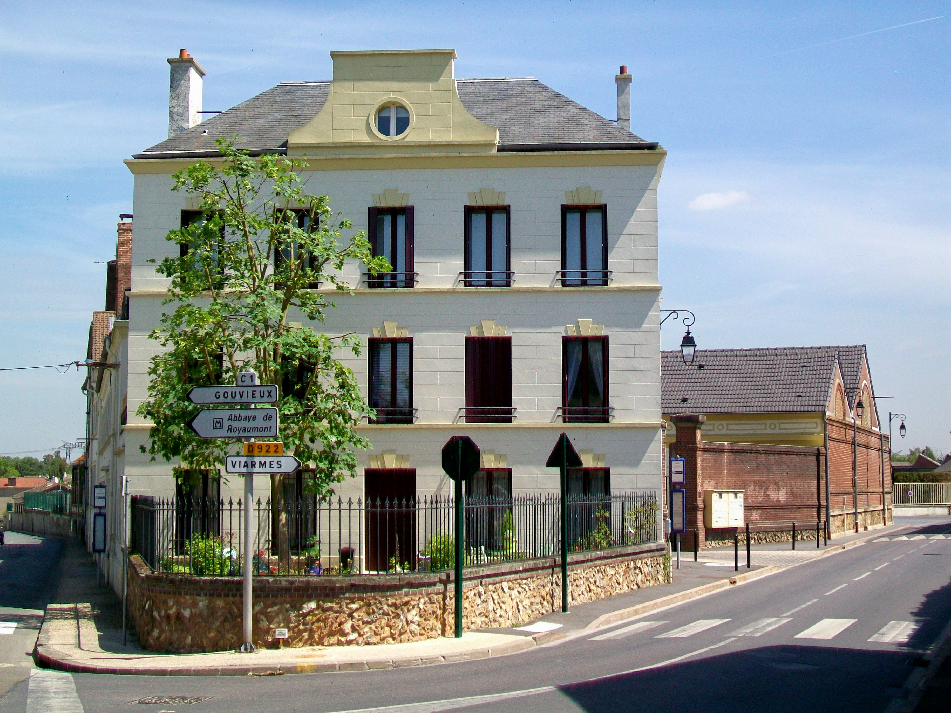 L'ancienne usine Vulli (Derolland-Delacoste) à Asnières-sur-Oise : ancien bâtiment administratif transformé en logements.